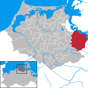 Sundhagen in Mecklenburg-Vorpommern - District Nordvorpommern